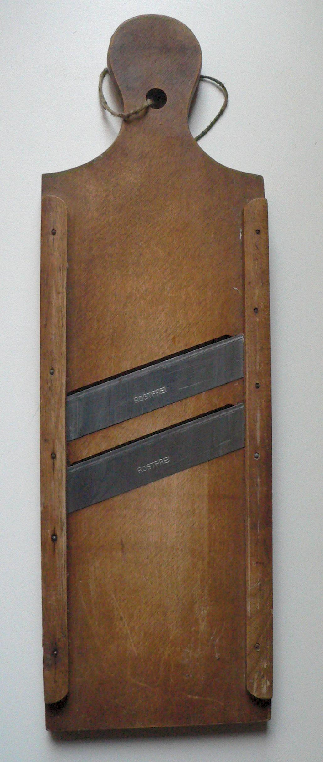 Gemüsehobel (um 1920) / vegetable slicer / mandoline (about 1920)